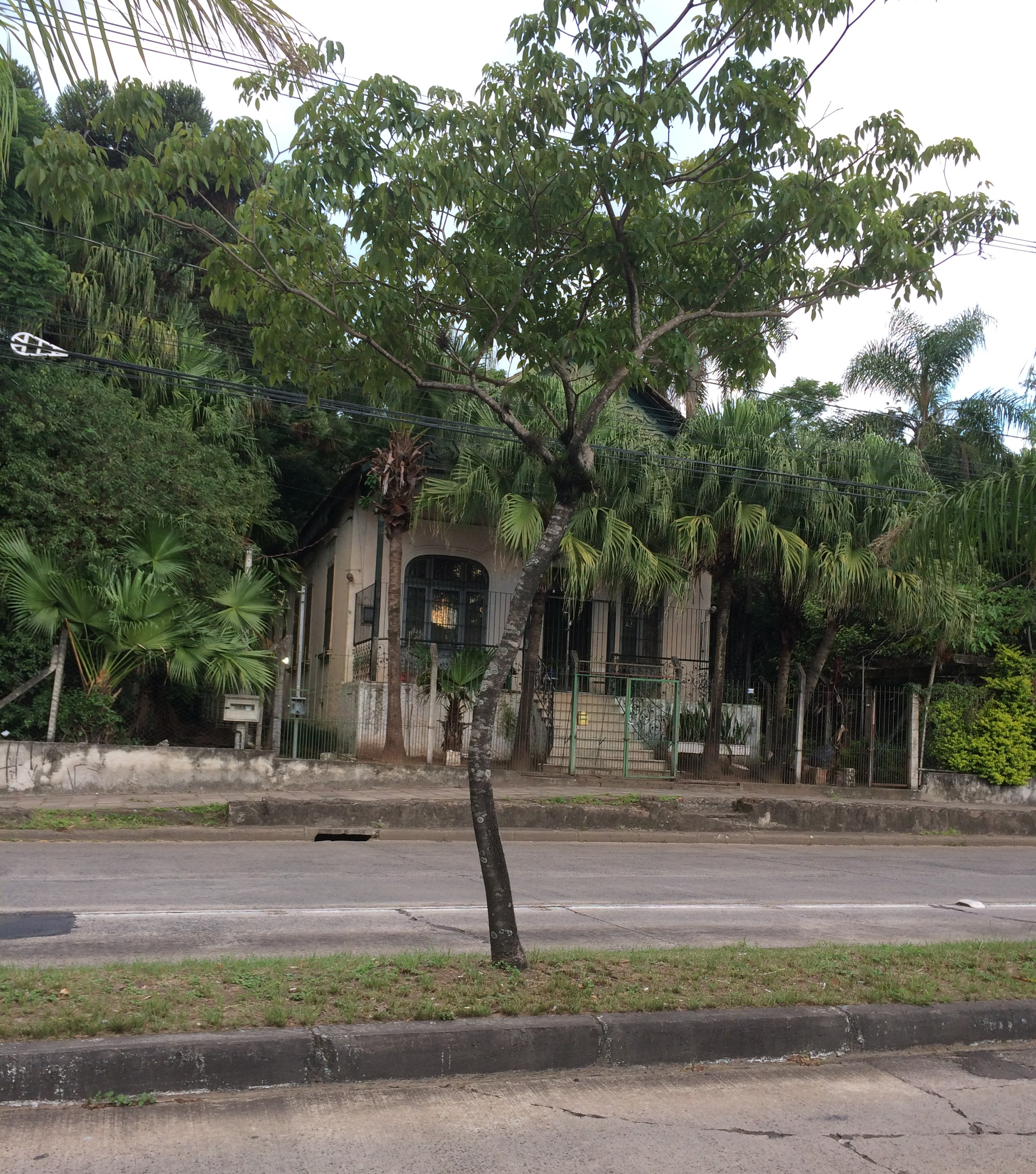 "Chácara Granata", casarão antigo na Avenida Teresópolis, n.° 3052, Bairro Teresópolis - Porto Alegre. Pertencente ao Município de Porto Alegre desde sua desapropriação em 2002, com planos de servir como centro comunitário.